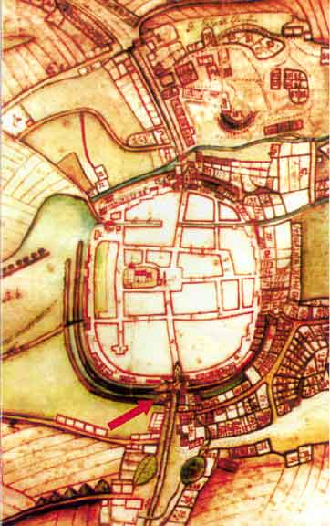 Stadtkarte von Teterow aus dem Jahr 1753